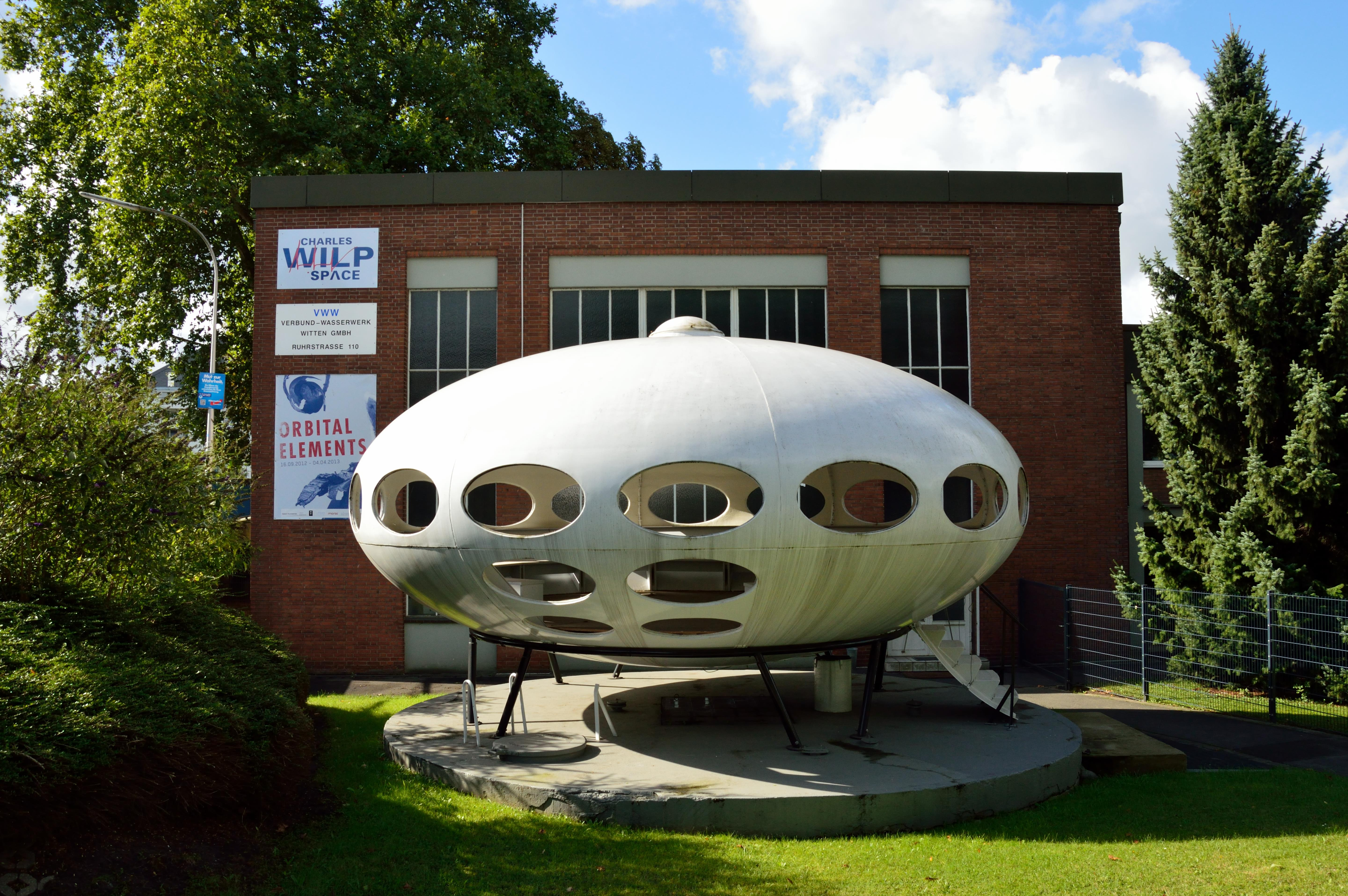 Museum des Designers Charles Wilp in Witten